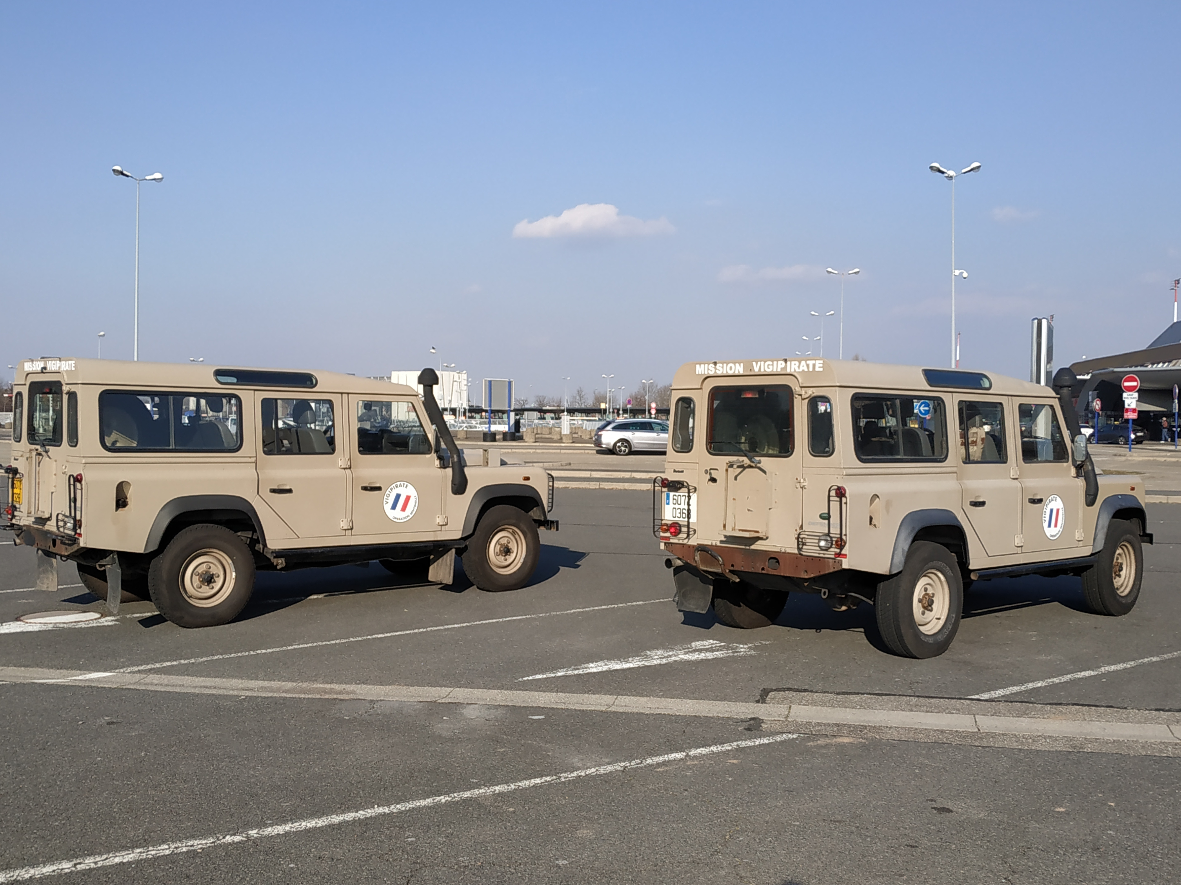 Land Rover Defender de la mission Vigipirate à l'aéroport de Strasbourg